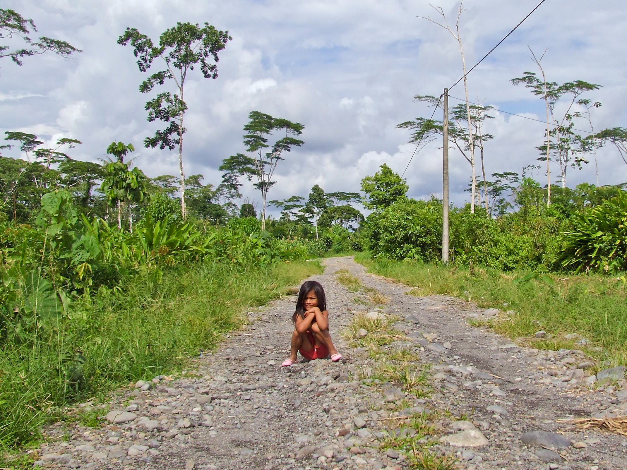 Shuar-Mädchen aus Ecuador. Welche Wege werden die Indigenen morgen beschreiten? Die Eltern des Mädchens haben mir bei meinem Aufenthalt bei den Shuar 2011 mündlich mitgeteilt, dass das Foto auf Wikipedia unter der Lizenz "Creative Commons – Namensnennung-Weitergabe unter gleichen Bedingungen 2.0" veröffentlicht werden darf.